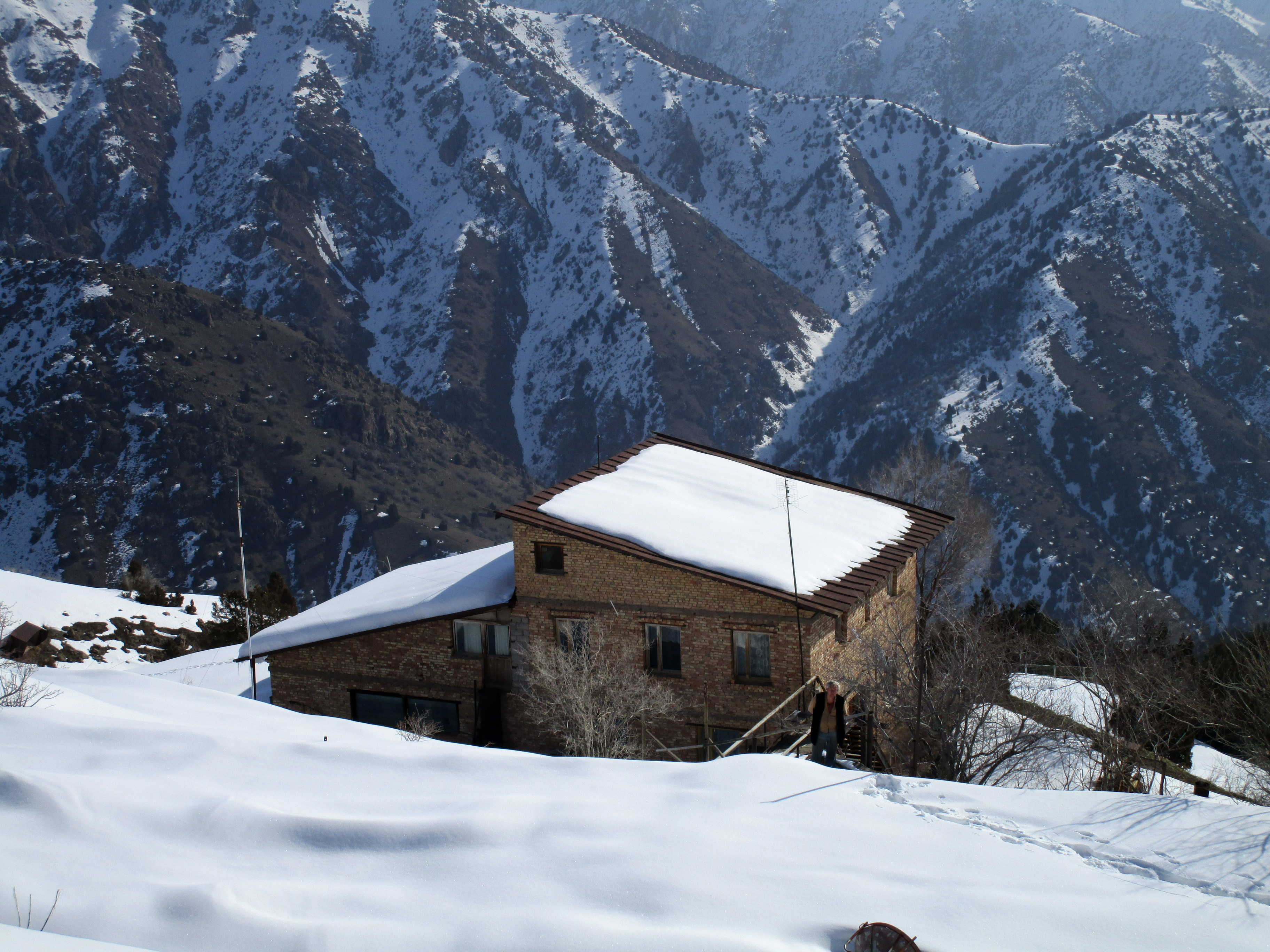 Вид на снеголавинную станцию "Дукант" с хребта Каттачон. Ахангаранский район, Ташкентская область, Республика Узбекистан.